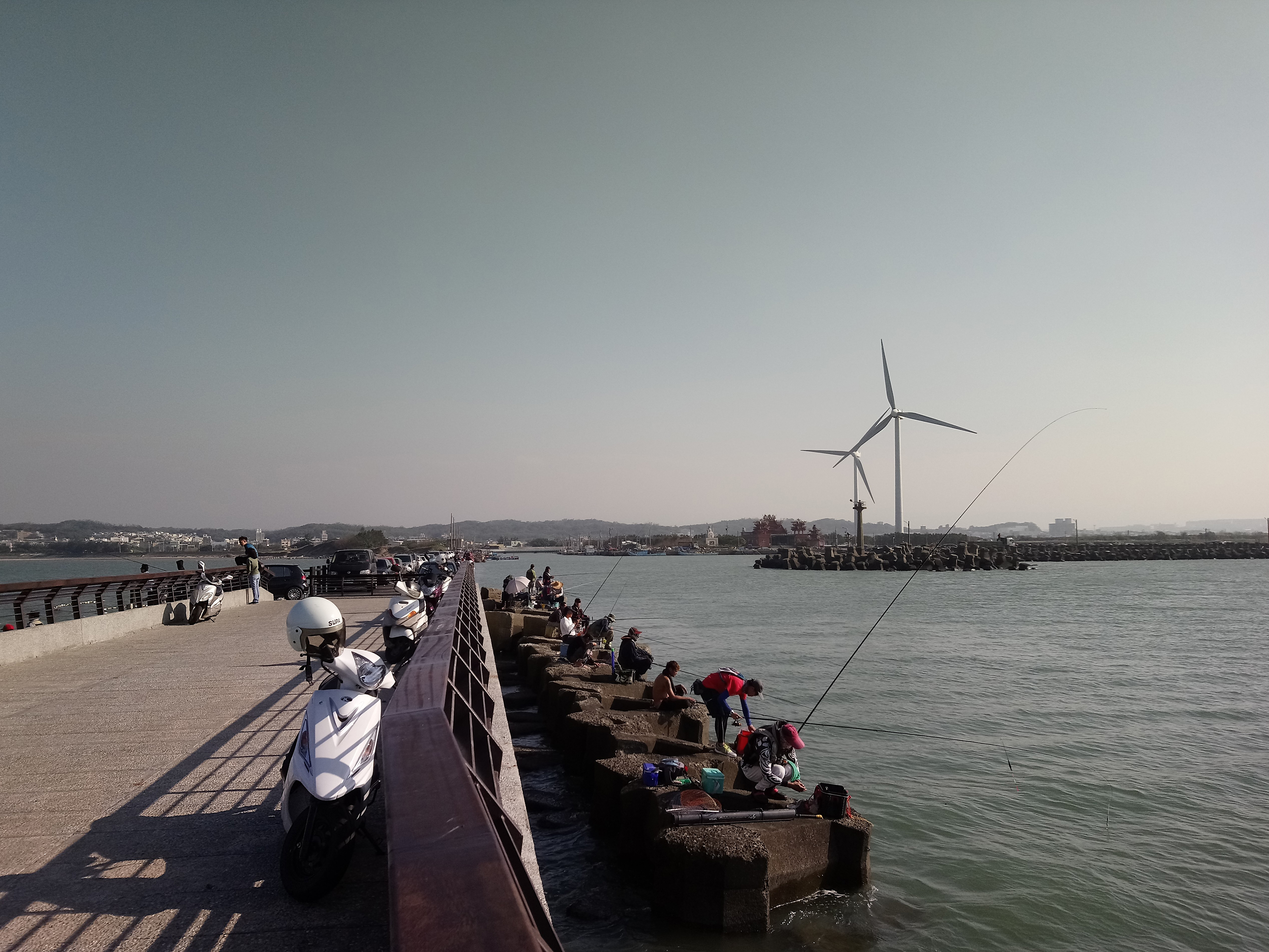 海山漁港內釣客,台灣省新竹市香山區香山聯里朝山里